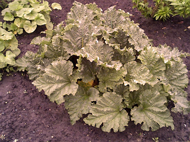 Rabarber. Serie foto's van een rabarberplant van 25 maart 2005 tot en met 13 mei 2005, één foto per week. Bestandsnamen: Rabarber-serie-1.jpg tot Rabarber-serie-8.jpg. Foto zelf gemaakt. Public Domain.